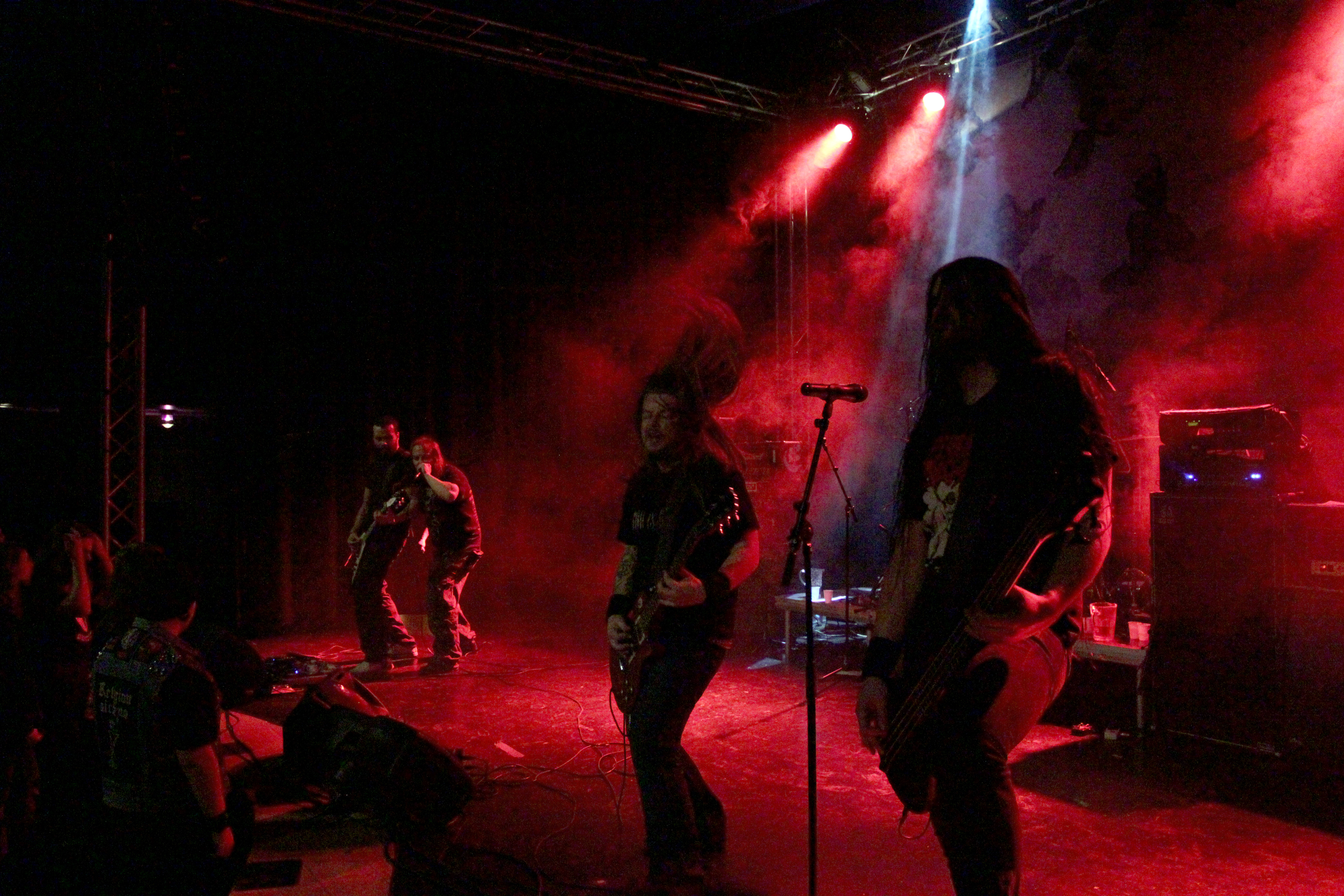 Entombed på Cozmoz, Borlänge, Sverige.